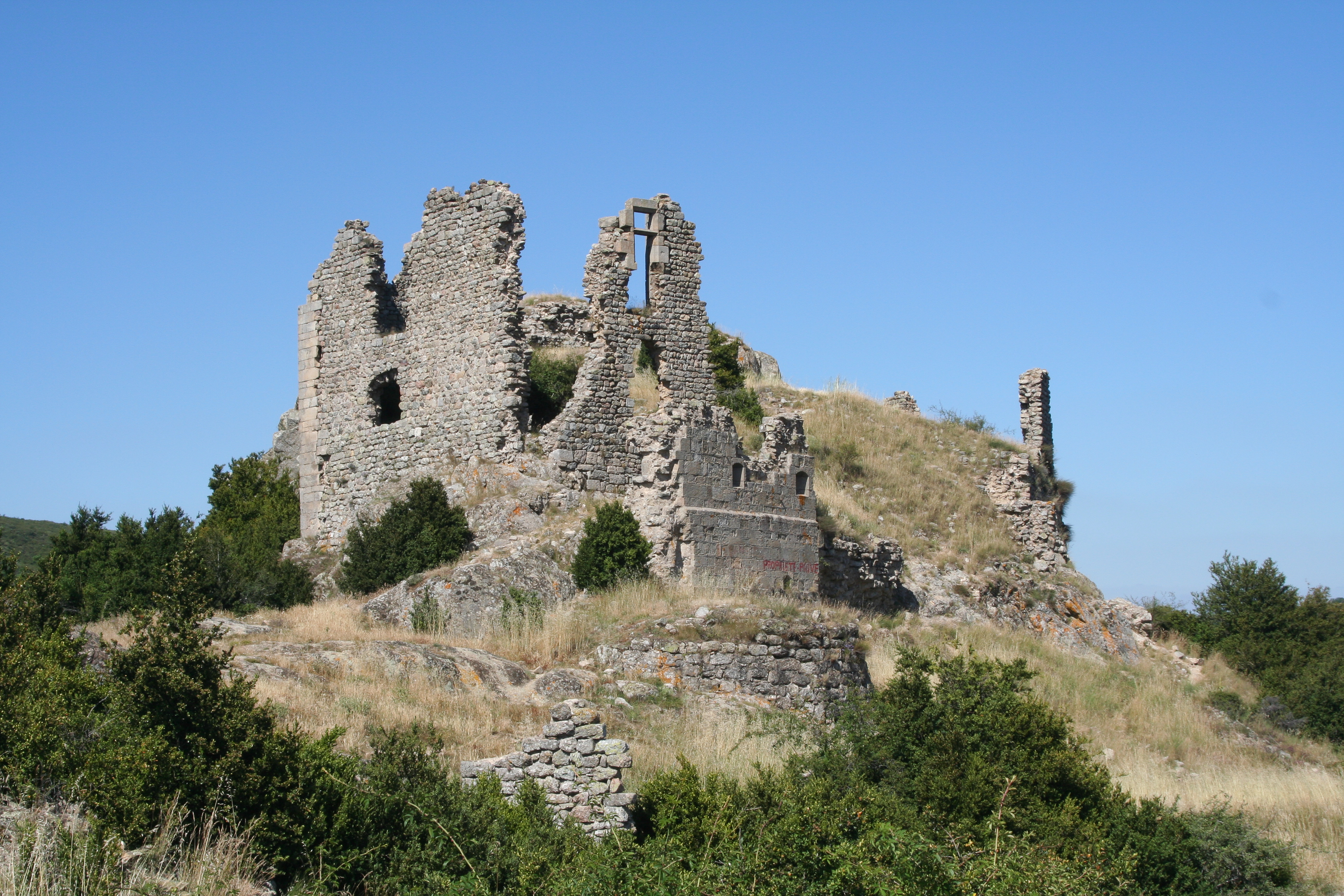 Château de Pierregourde